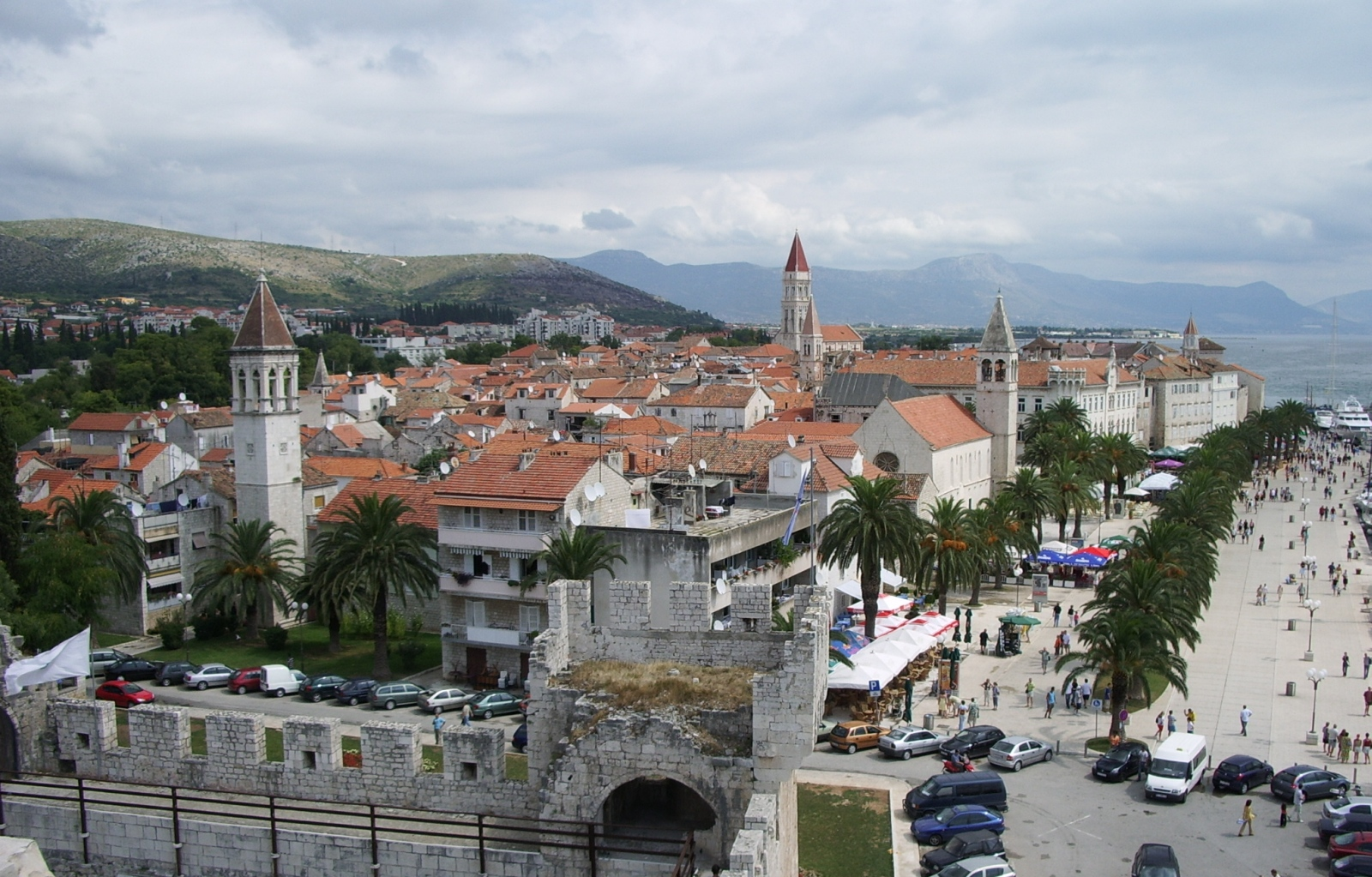 Altstadt von Trogir, fotografiert von der Festung Kamerlengo